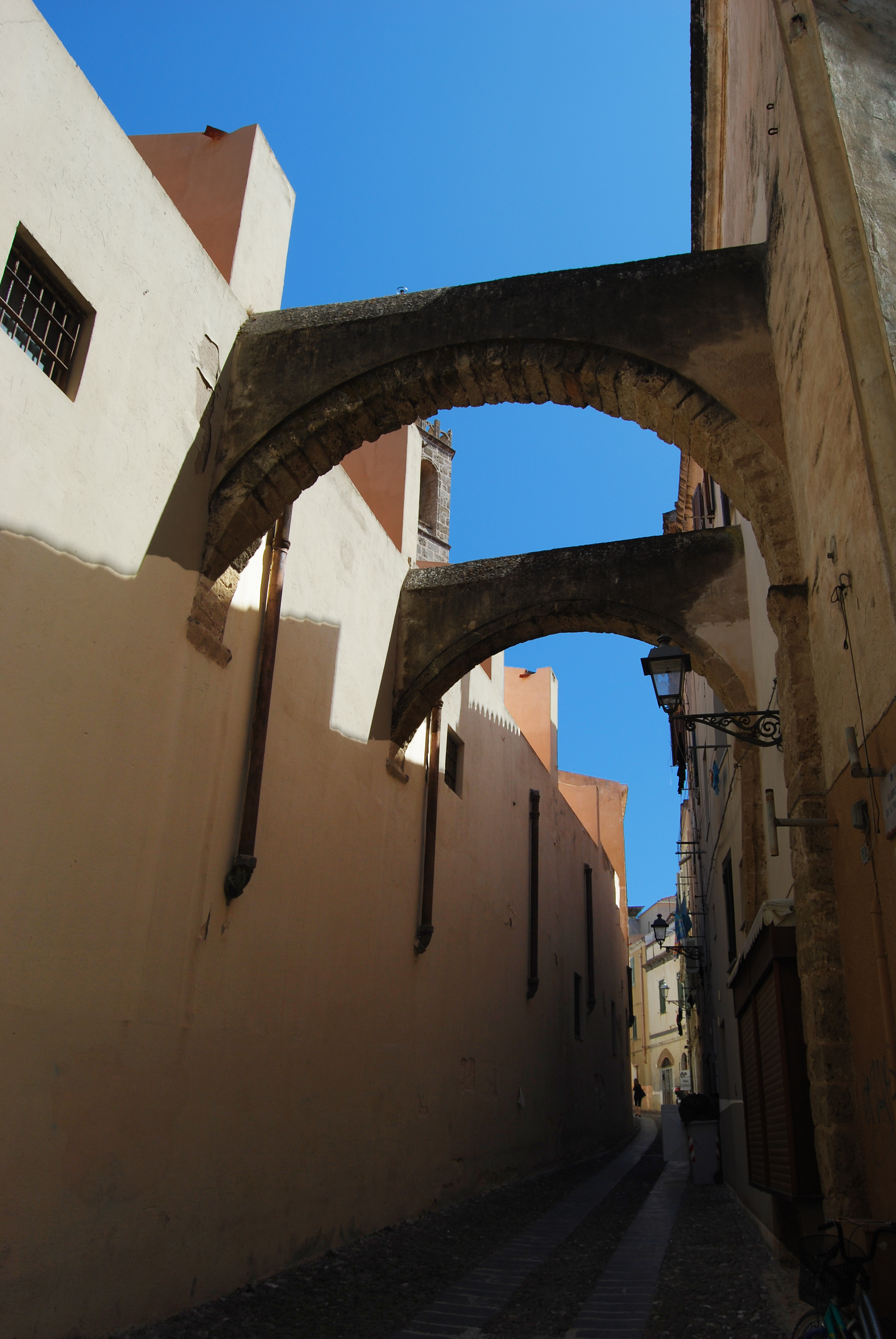 Alghero